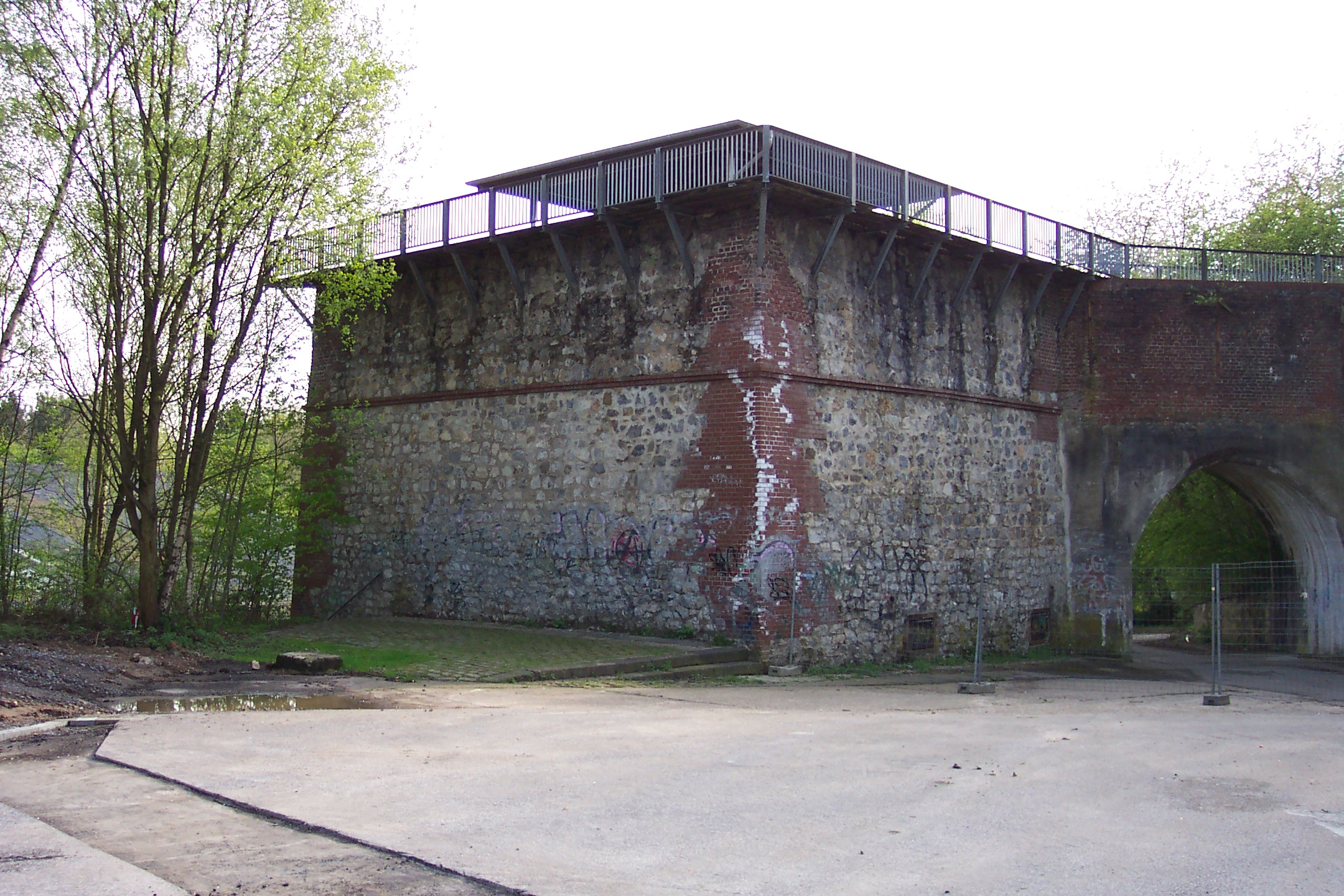 Der Eulenkopfweg, Wuppertal